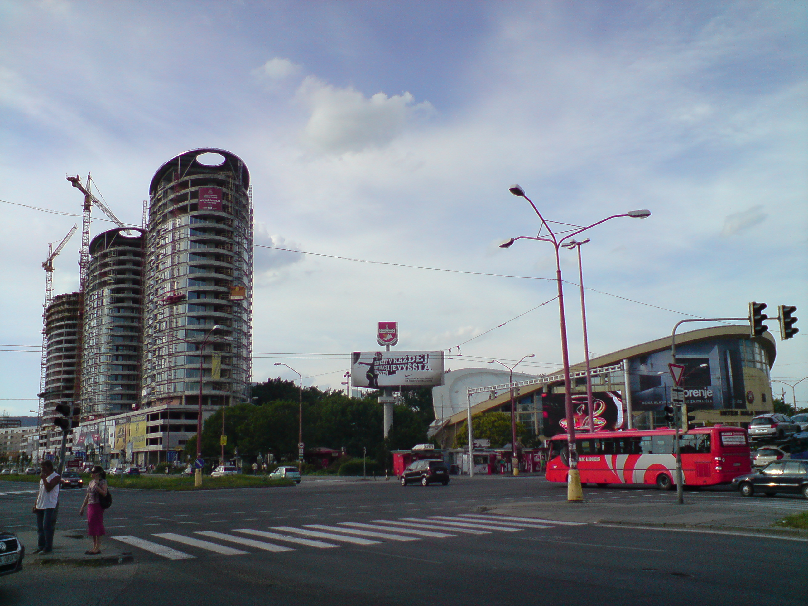 Bajkalská